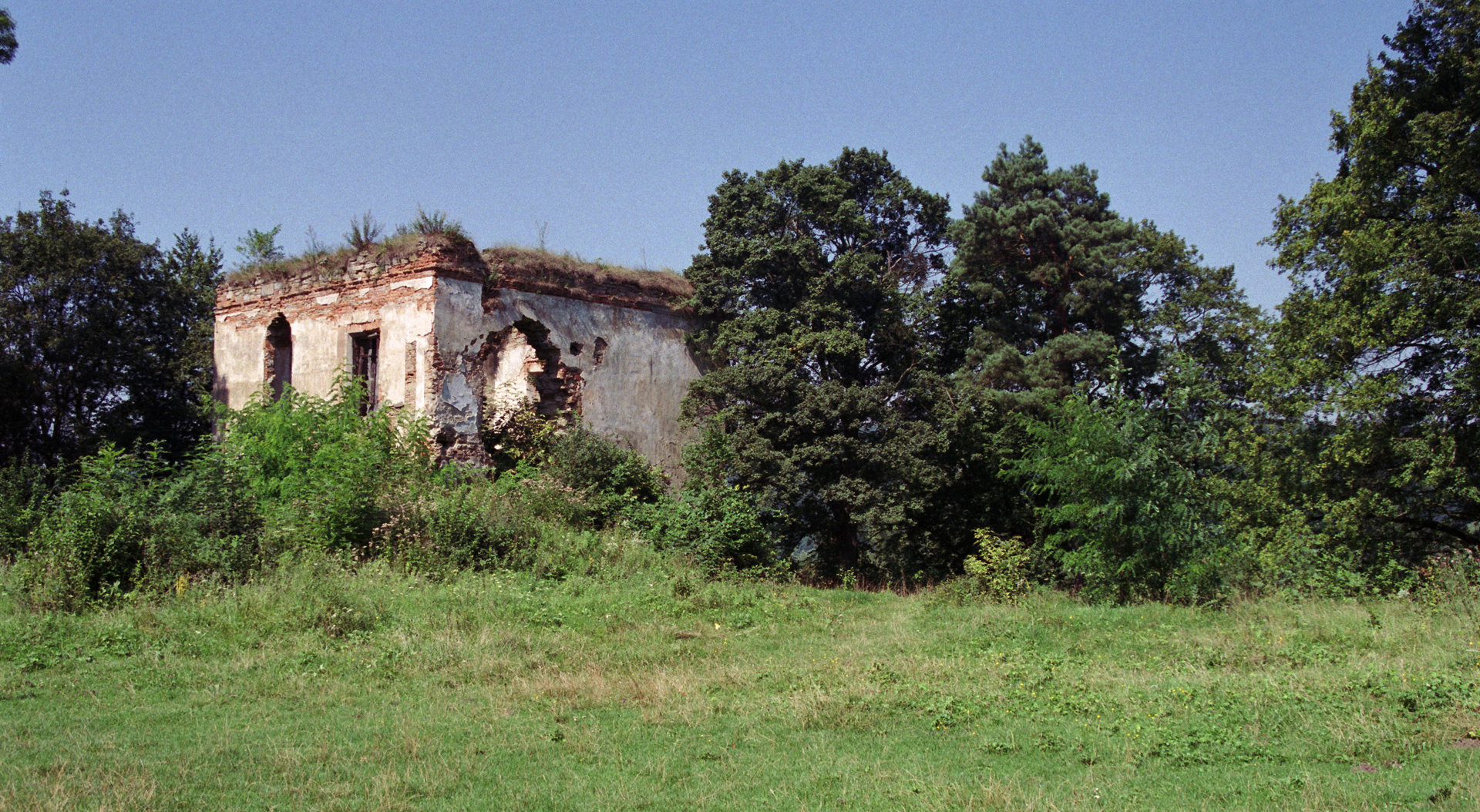 Dąbrówka Starzeńska - zespół zamkowy: ruiny zamku (zabytek nr A-184 z 14.05.1968)